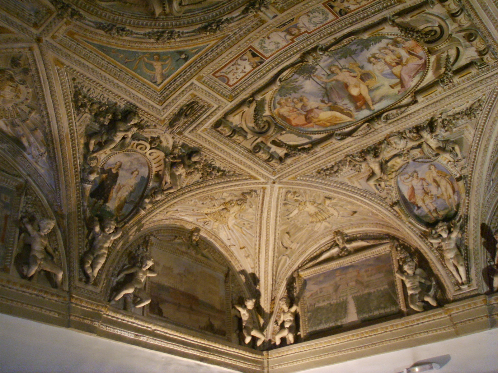 see filename, painters from Jacopo Chiavistelli